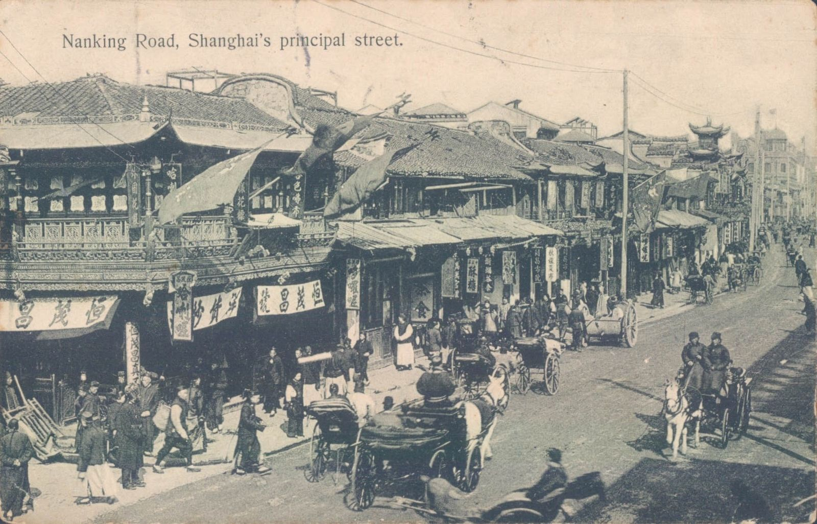 上海南京路旧照